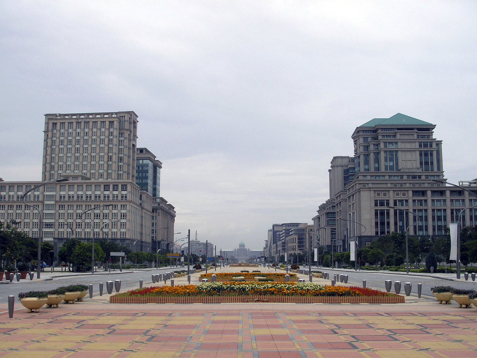 Image of Putrajaya